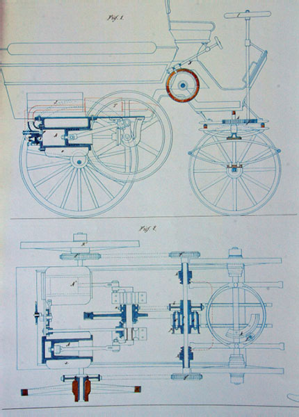 Brevet 160 267. Première automobile à quatre roues. délivré à MM. Edouard Delamare-Deboutteville et Léon Paul Charles Malandin le 12 février 1884